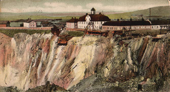 Falu koppargruva ca 1907. Foto efter gammalt vykort